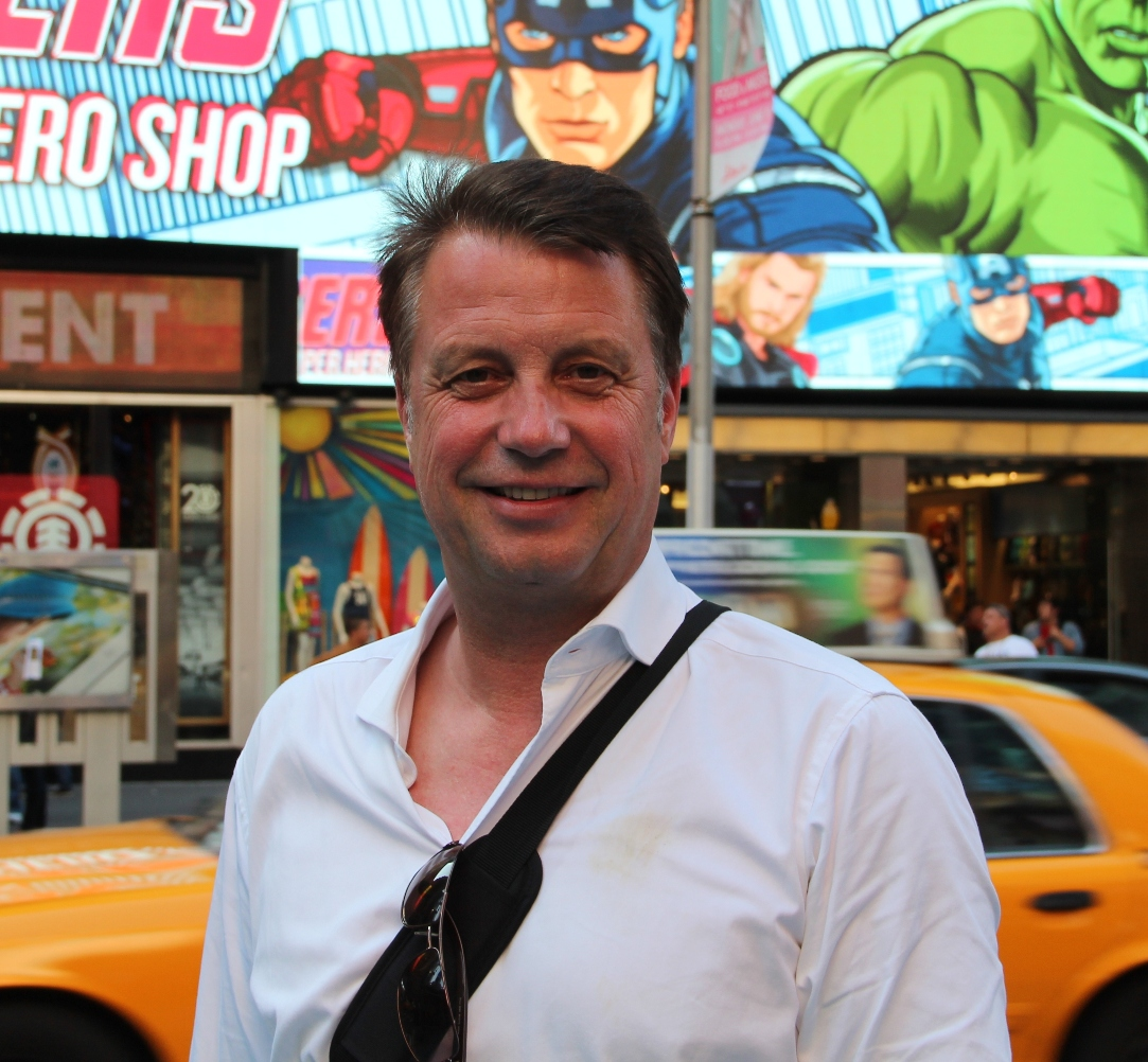 Ulf Montanus in New York (2012)